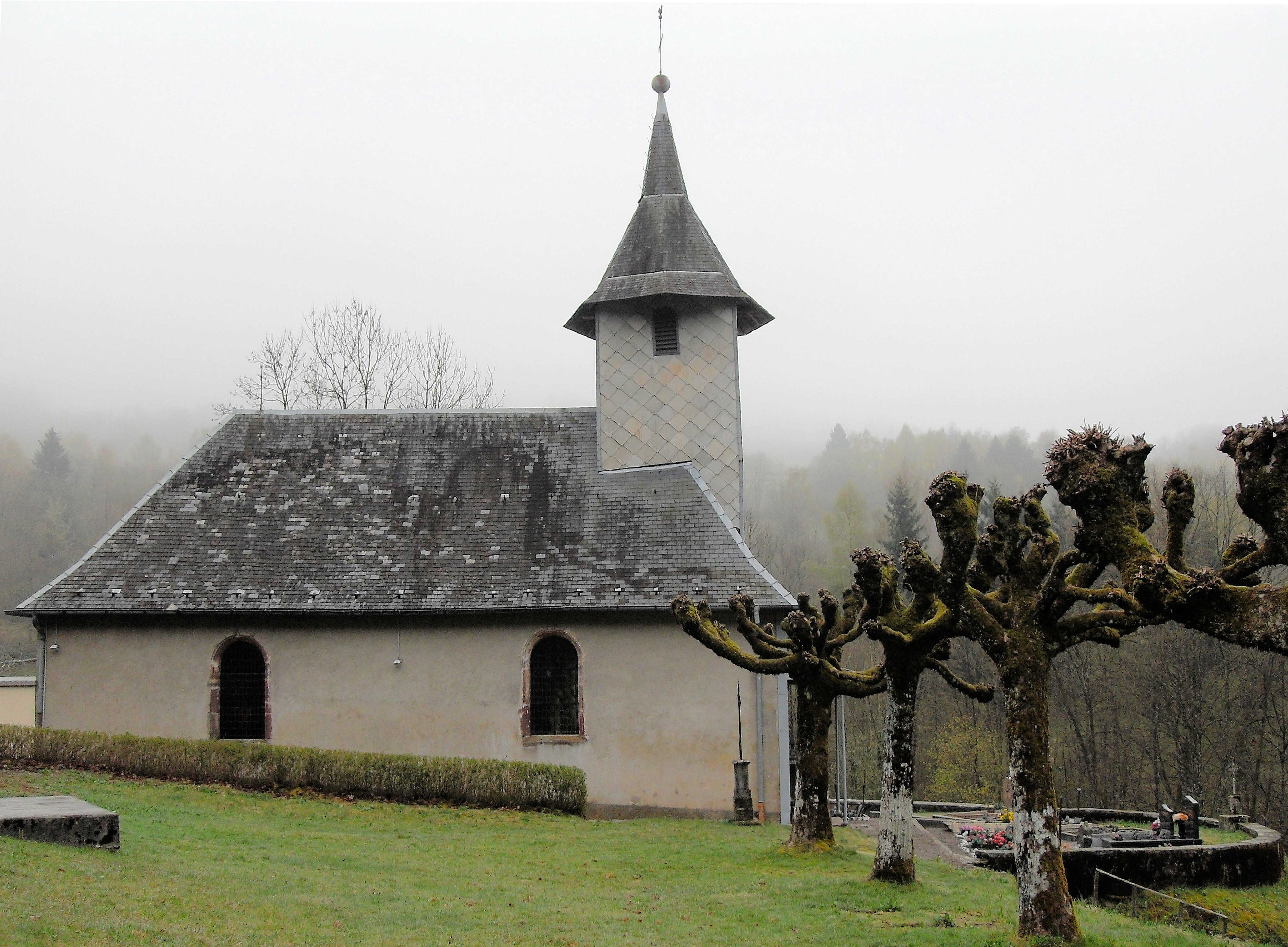 L'église Notre-Dame de l'Assomption,_anciennement chapelleSainte-Barbe á Château-Lambert, commune de Haut-du-Them-Château-Lambert